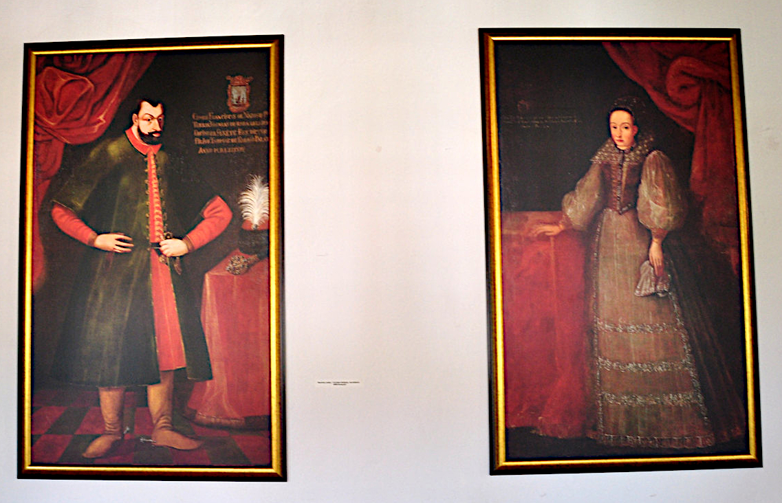 Csejte múzeum Nádasdy Ferenc és Ecsedi Báthori Erzsébet portréja